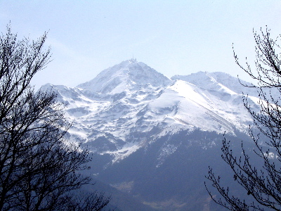 Pic du Midi de Bigorre, vu du Monné photographie prise le 17 mars, 2004 par Nathan